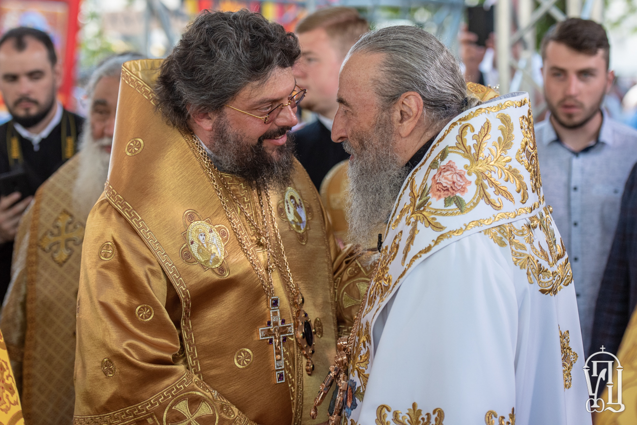 Літургія-князя-Володимира-72